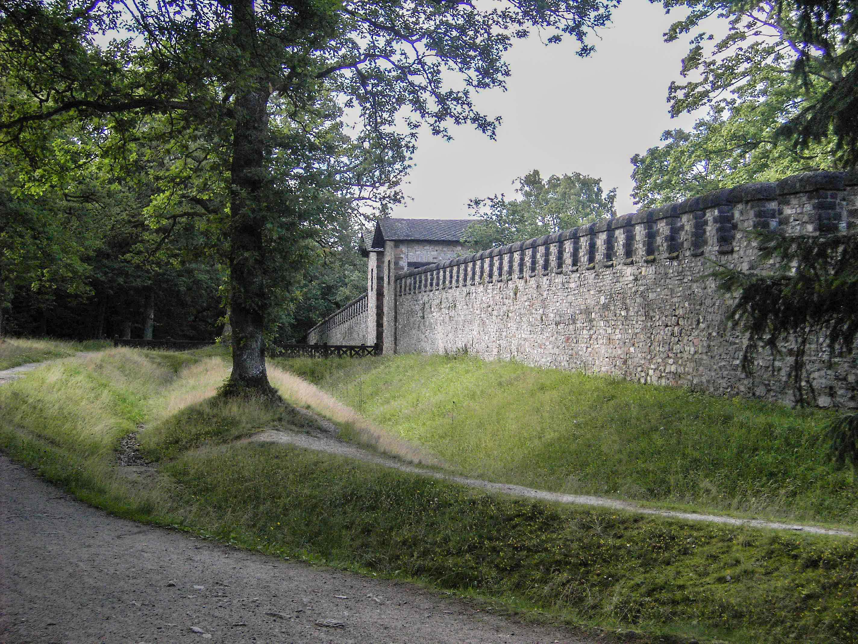 Außenansicht der westlichen Wehrmauer mit Porta Principalis Dextra. Rekonstruktion des Kastells Saalburg. Der spitz ausgeschachtete Doppelgraben war niemals mit Wasser gefüllt und diente als Annäherungshindernis.